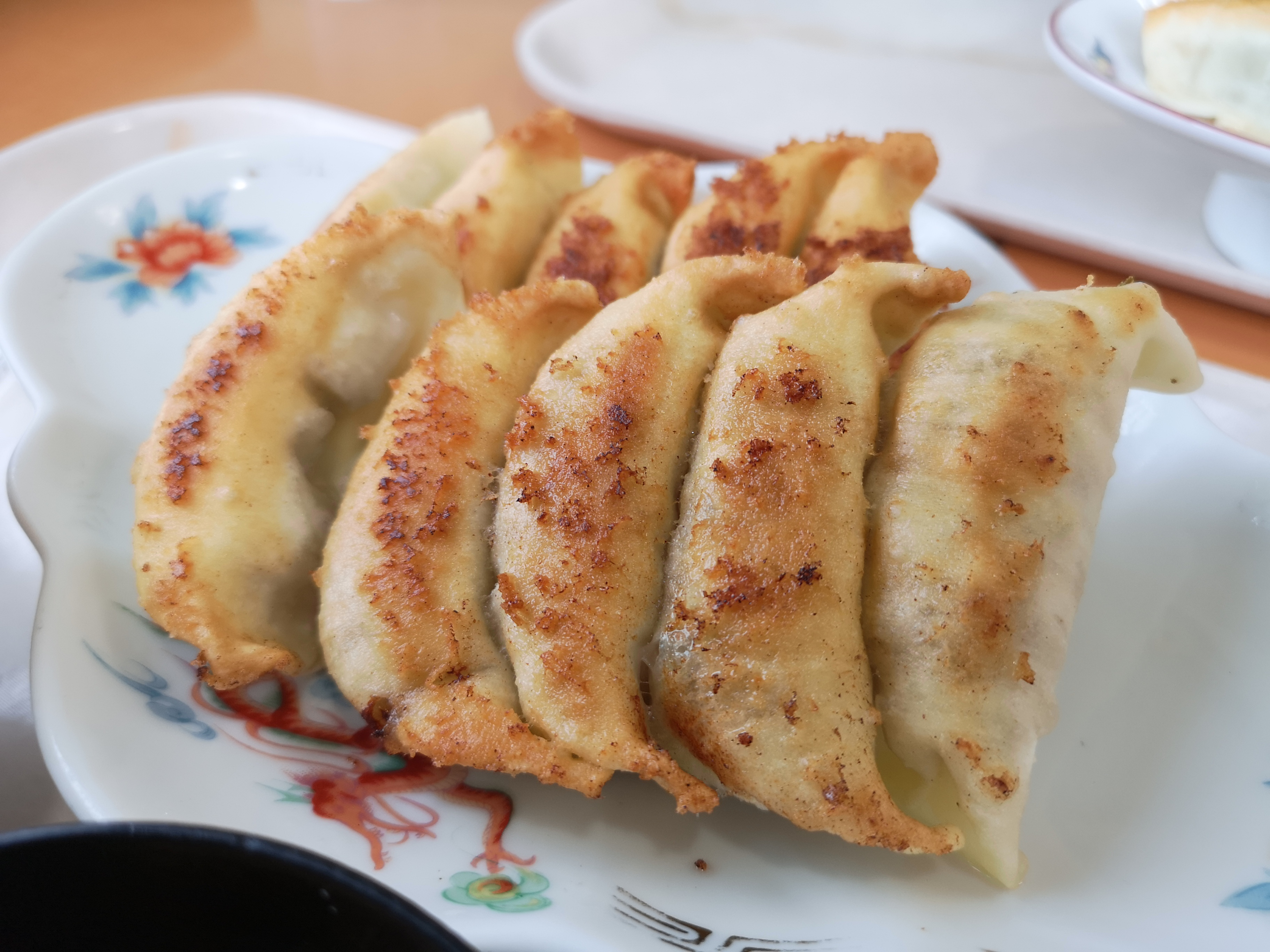 静岡県浜松市に所在する「福みつ」で提供される浜松餃子。皮が厚い。